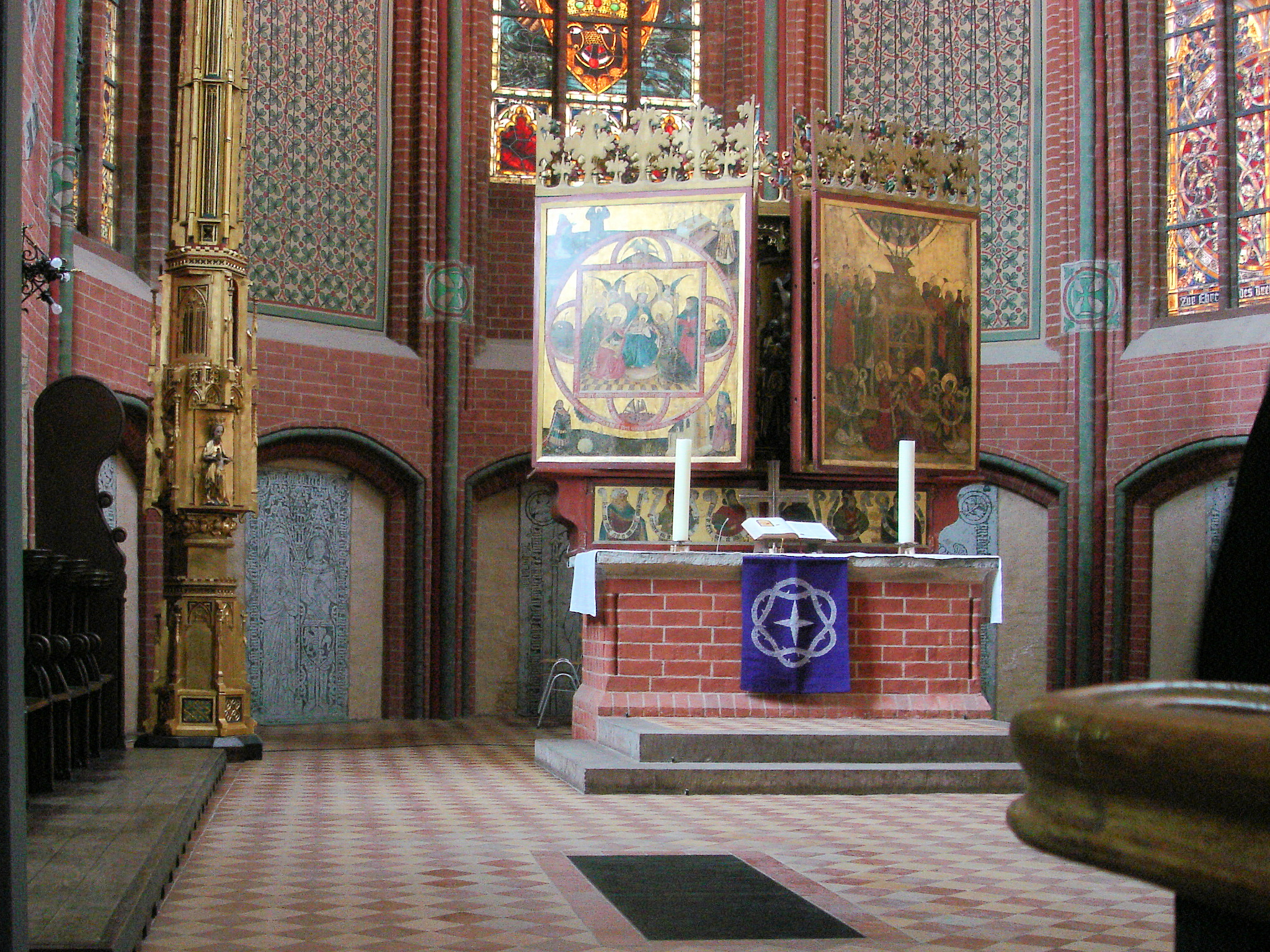 Universitätskirche Rostock, geschlossener Flügelaltar